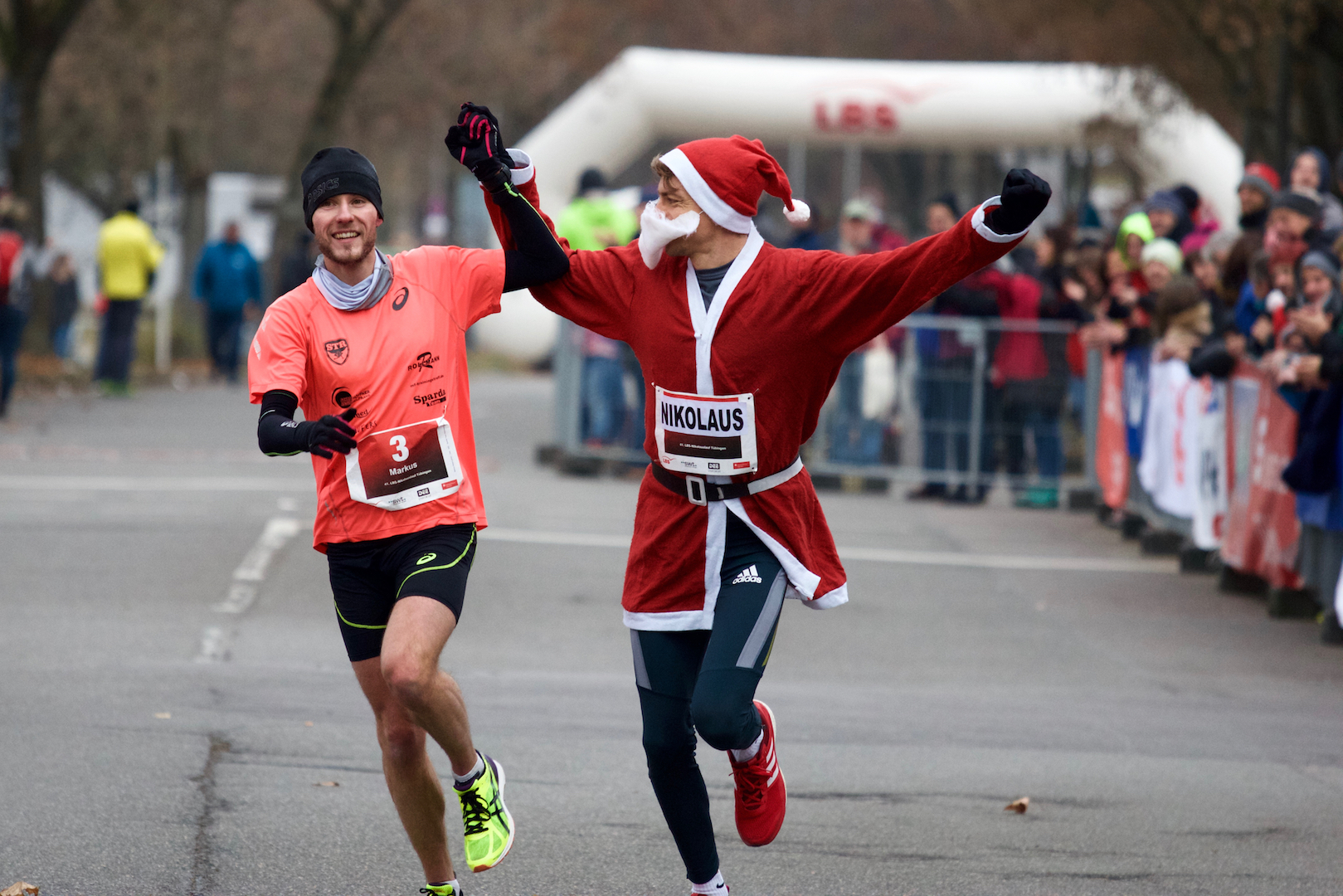 Der zweitplatzierte Markus Weiss-Latzko beim traditionellen Zieleinlauf beim 41. LBS-Nikolauslauf Tübingen 2016.